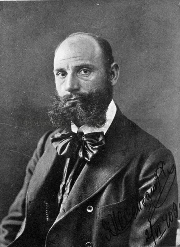 Яне Сандански.